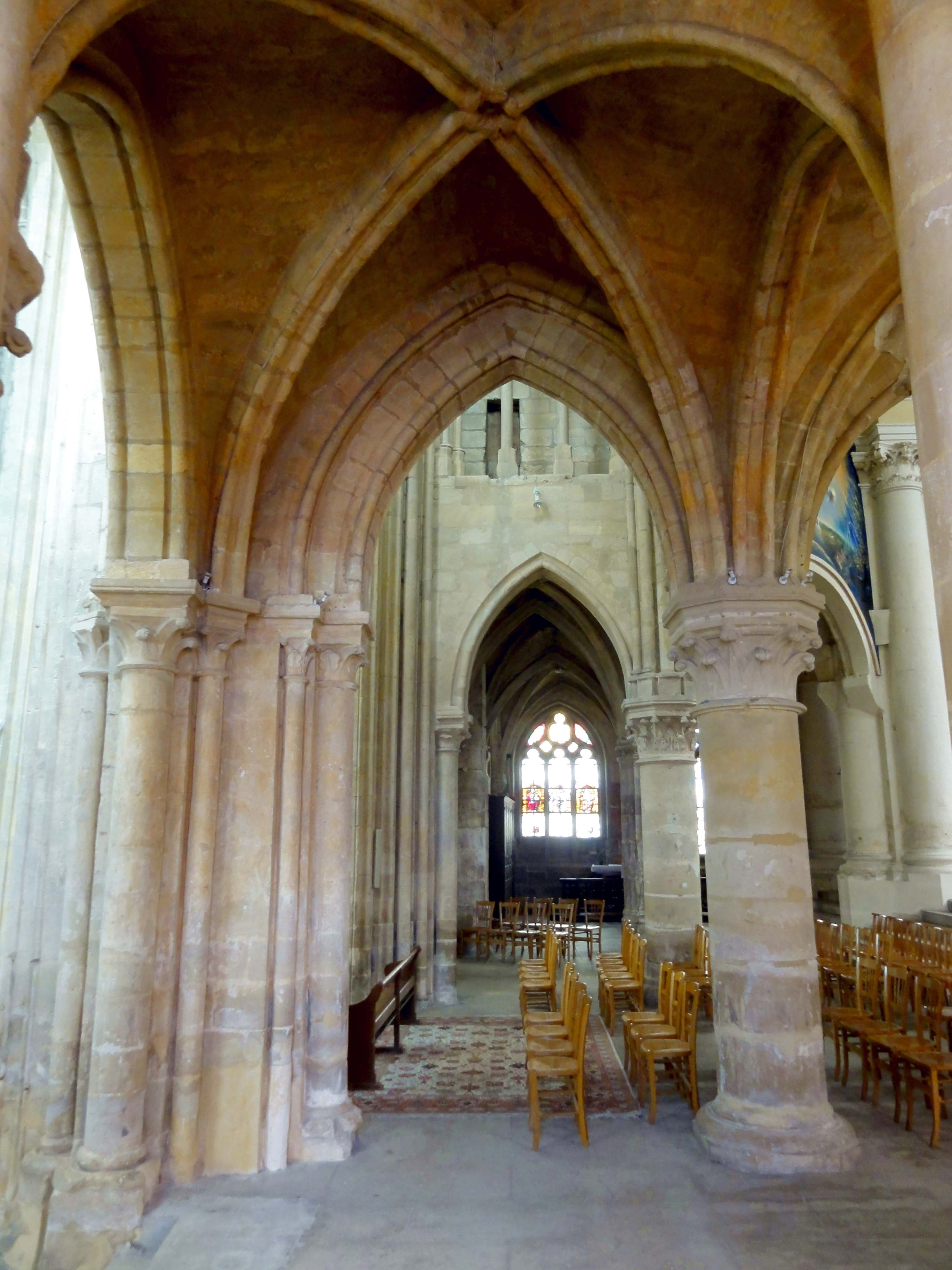 Intérieur de l'église - voir titre.